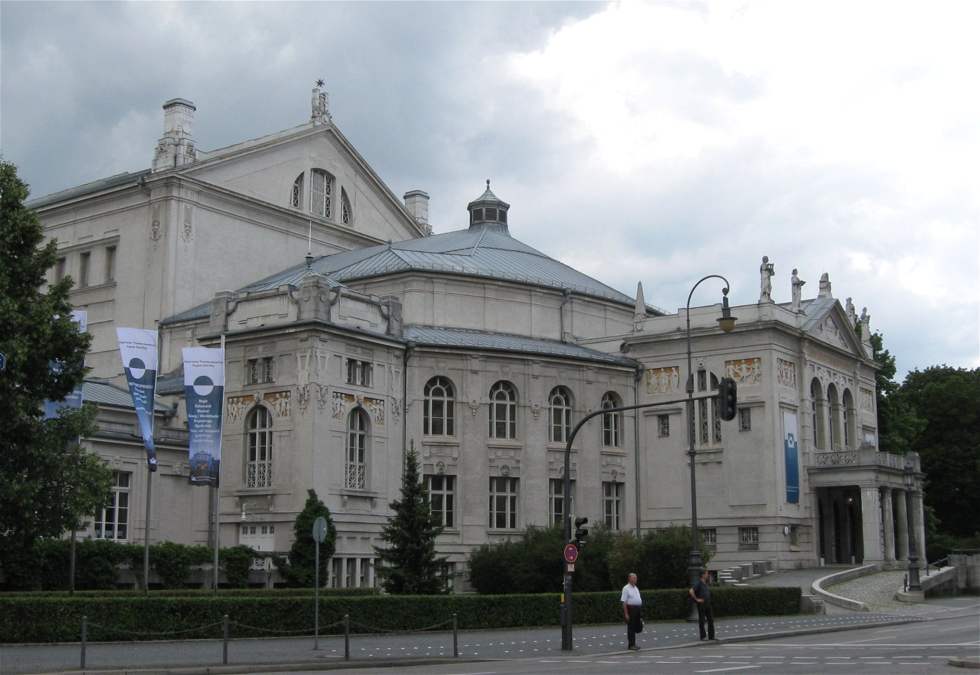 Prinzregententheater in München